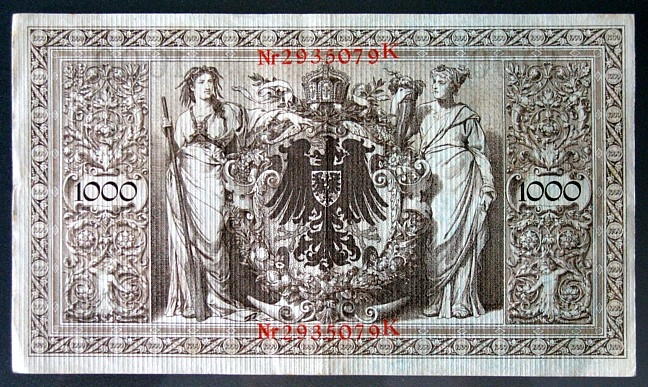 Banknote - 1000 Mark - Deutsches Reich - 21.04.1910